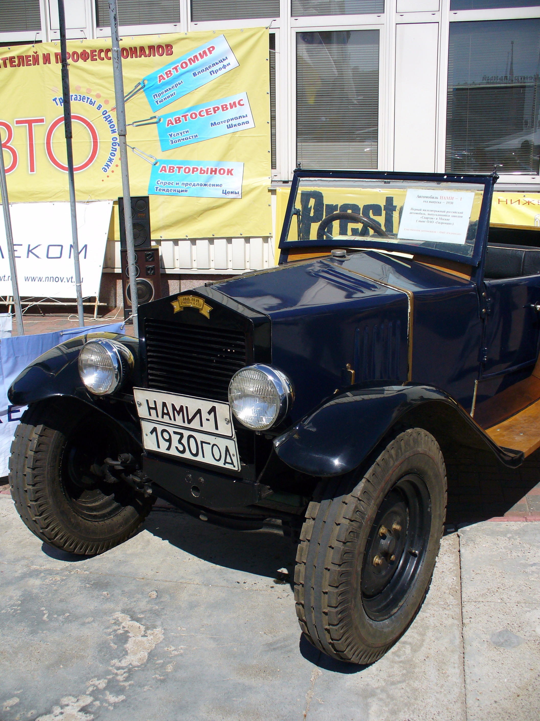 NAMI1